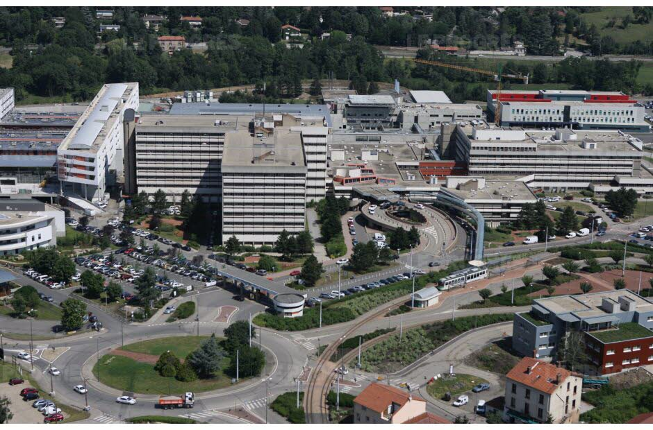 Hôpital Nord Saint-Priest-en-Jarez